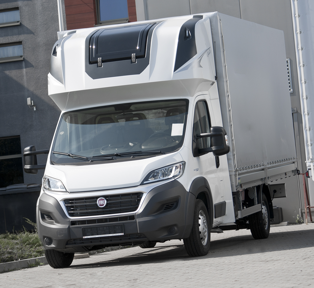 Skrzynie z plandeką z kabiną sypialna, to jeden z najbardziej popularnych rodzajów pojazdów logistycznych w Polsce świadczący usługi międzynarodowe.